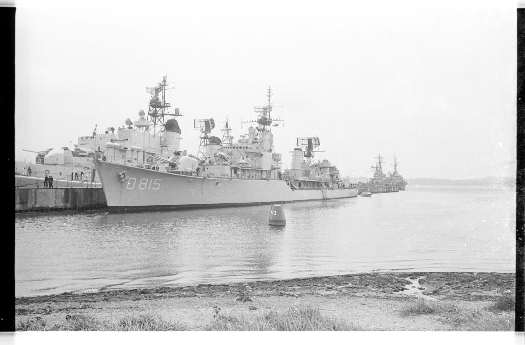 In der Bildmitte der Zerstörer OVERIJSSEL (D 815, niederl.).